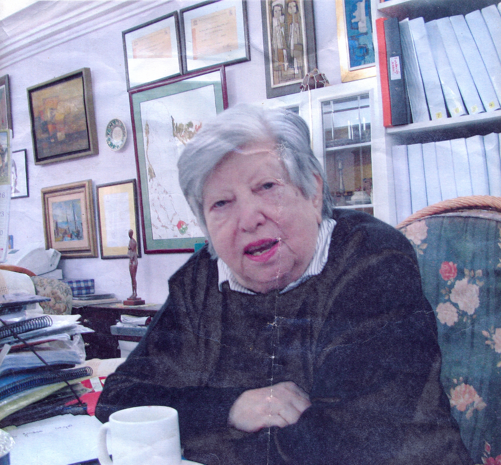 María Isabel Chorobik de Mariani, nacida el 19 de noviembre de 1927